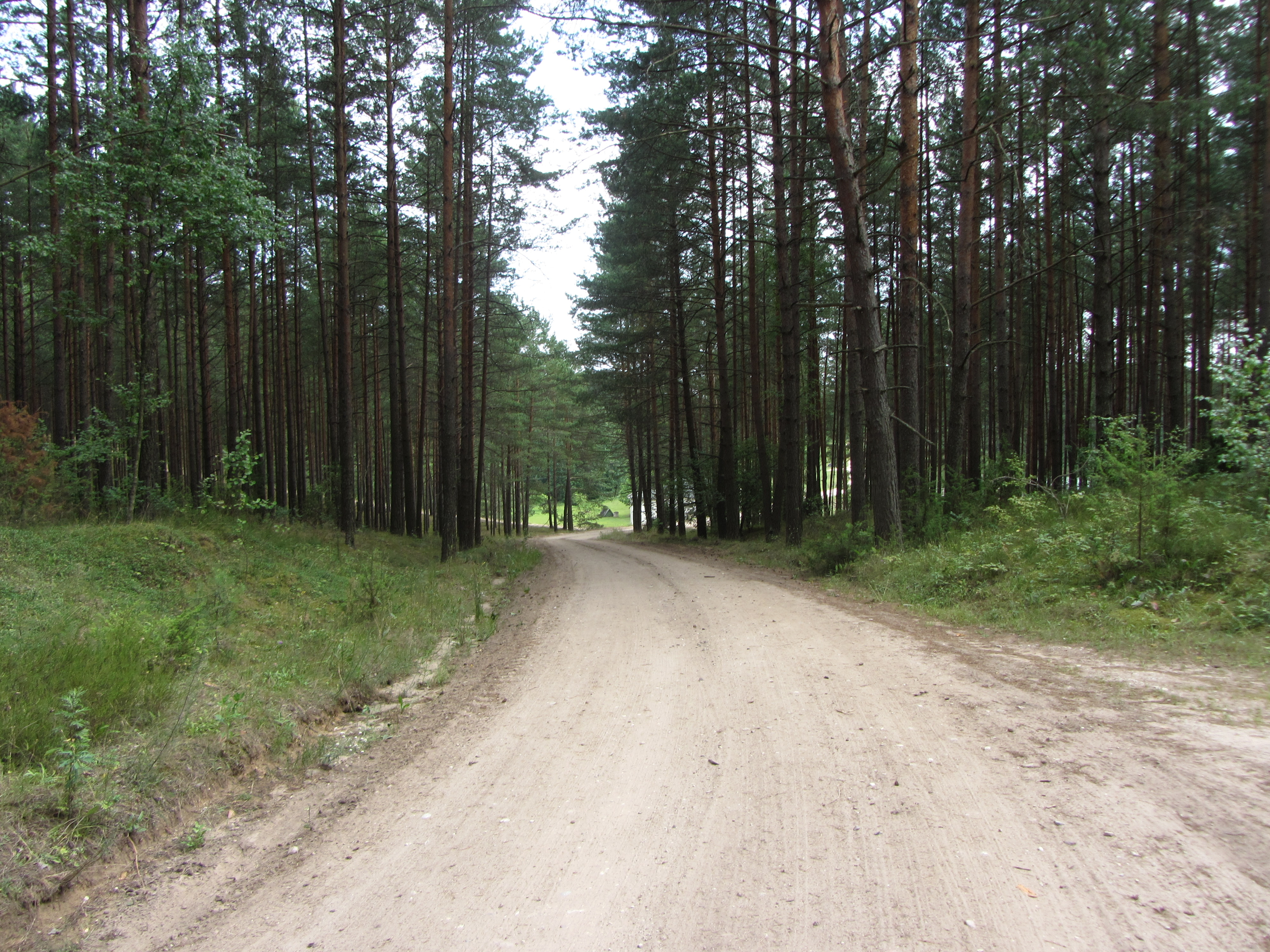 Leipalingio sen., Lithuania